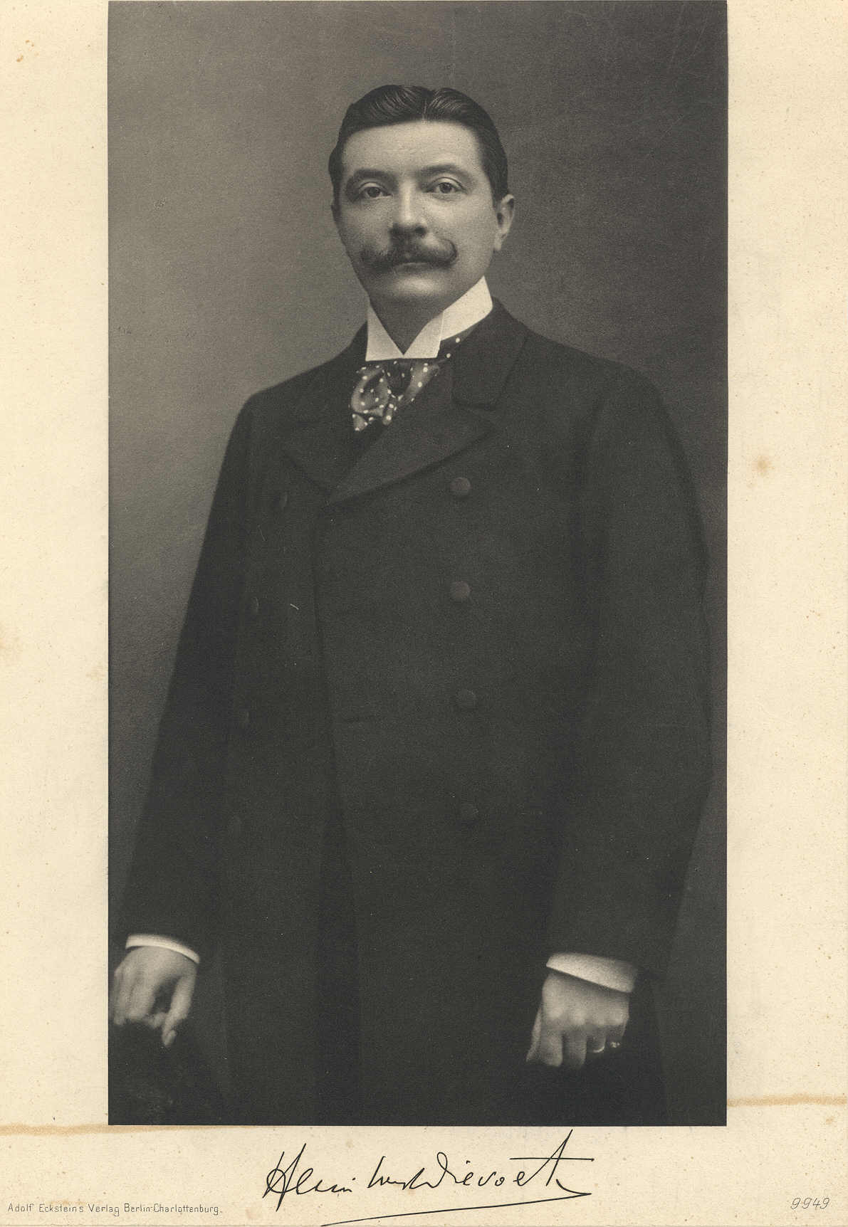 Henri van Dievoet, architecte. Portrait paru dans "La Belgique d'aujourd'hui", sous la direction de Gustave DELTOUR, Berlin-Charlottenburg, Adolf Eckstein, vers 1908.